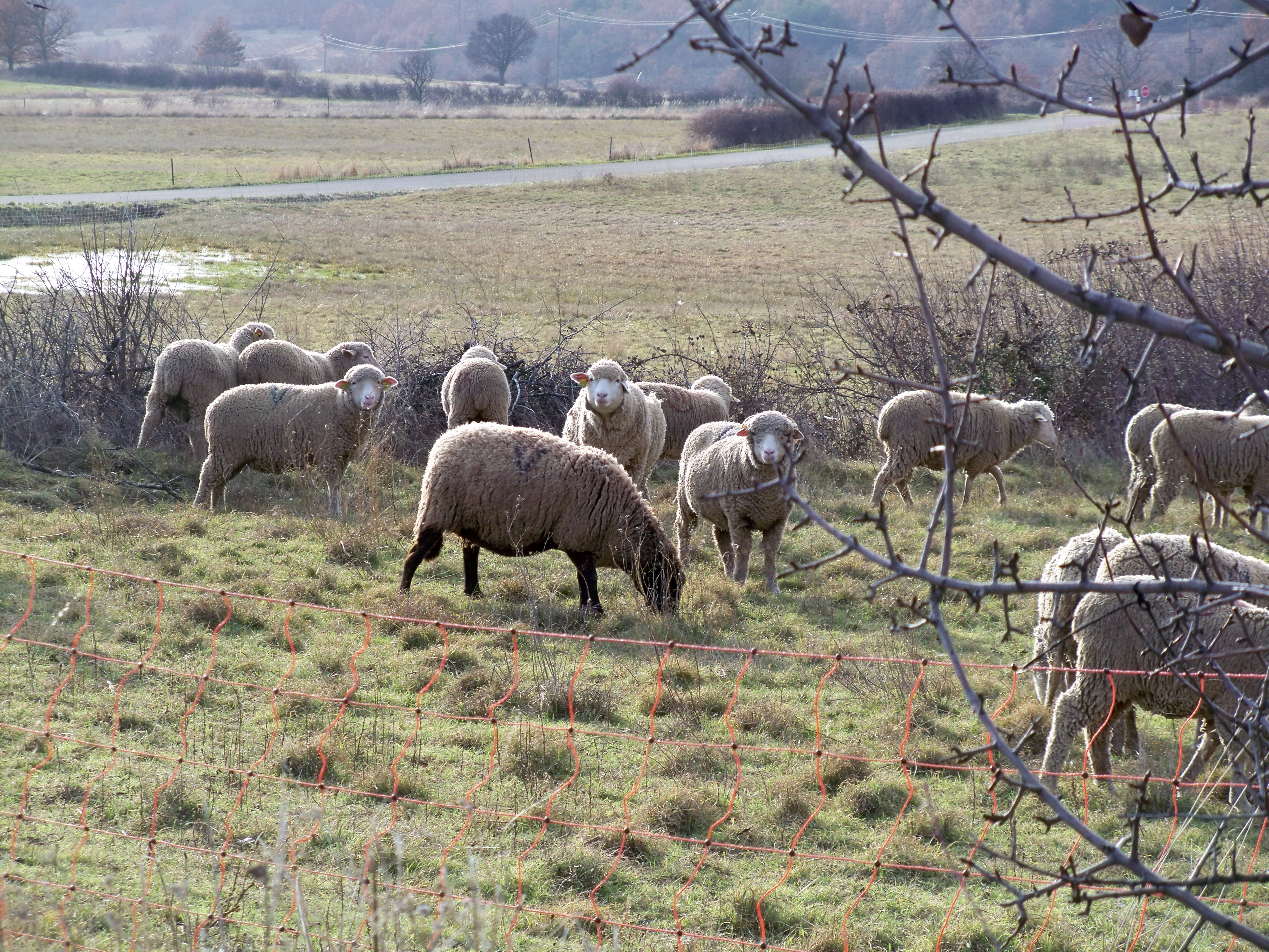 troupeau de moutons à Saumane (04), France